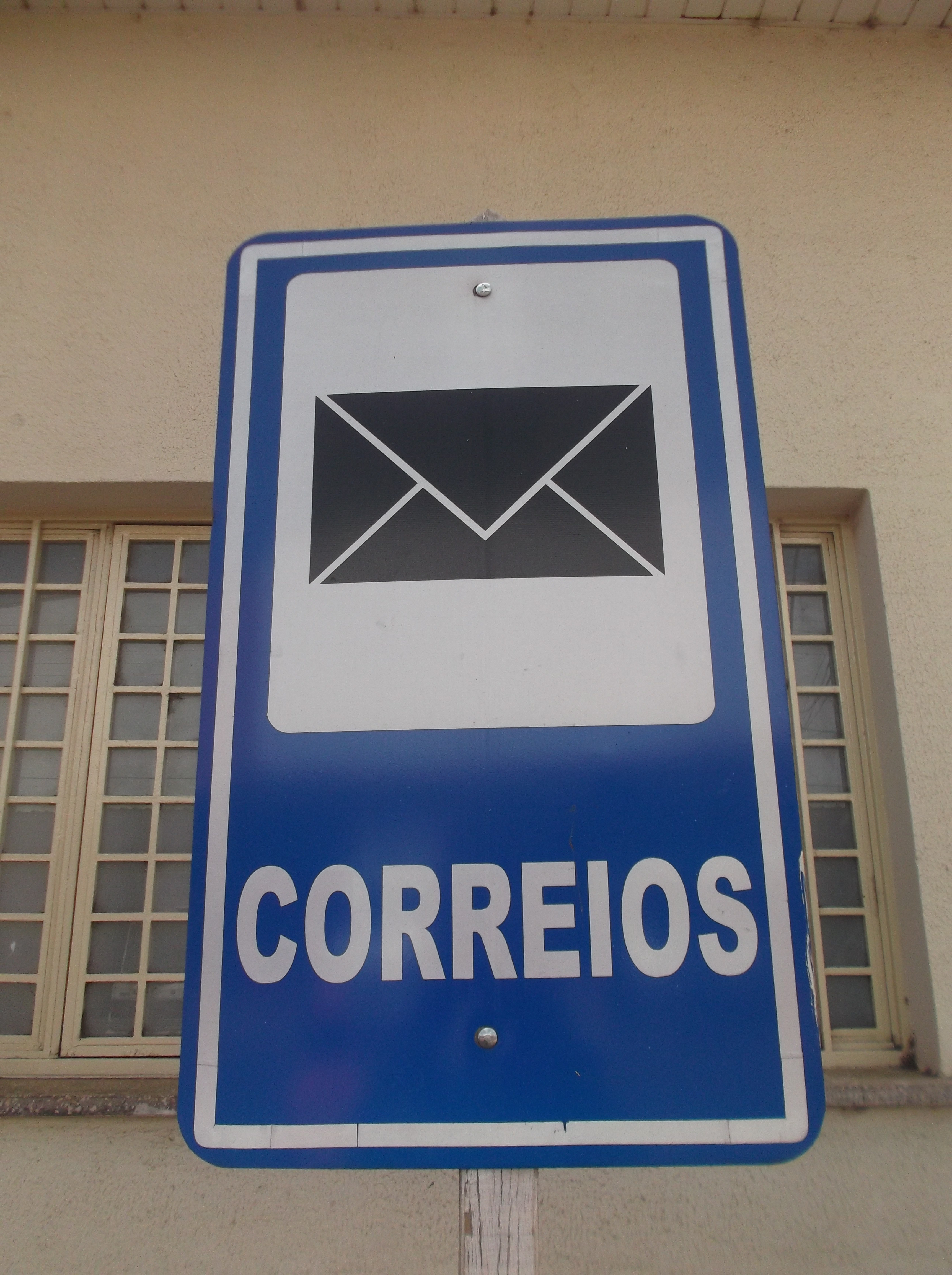 Placa indicativa de agência de Correio de acordo co o Código de Trânsito do Brasil - Lei nº 9.503.